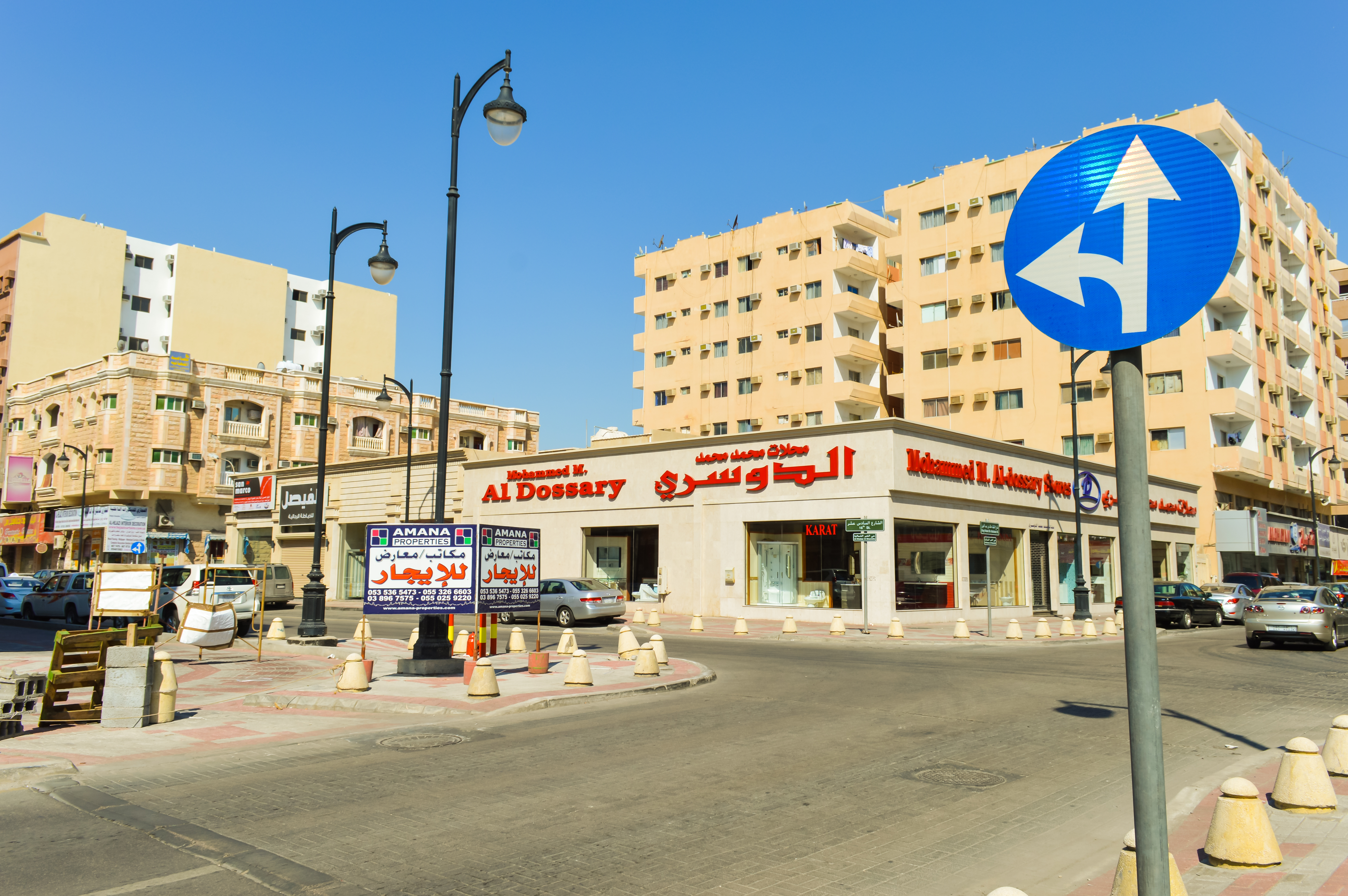 Al Dossary